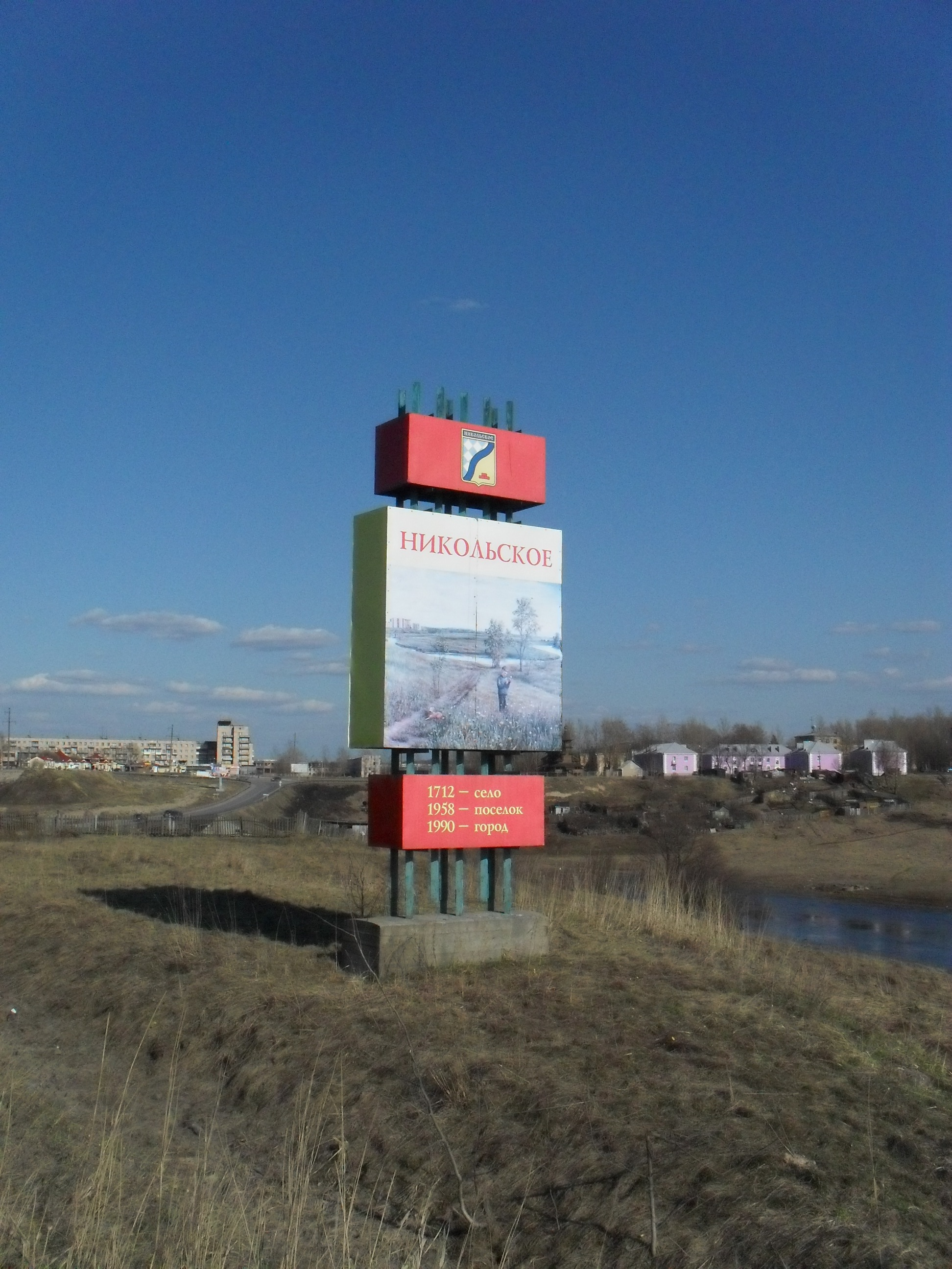 Никольское с западной стороны